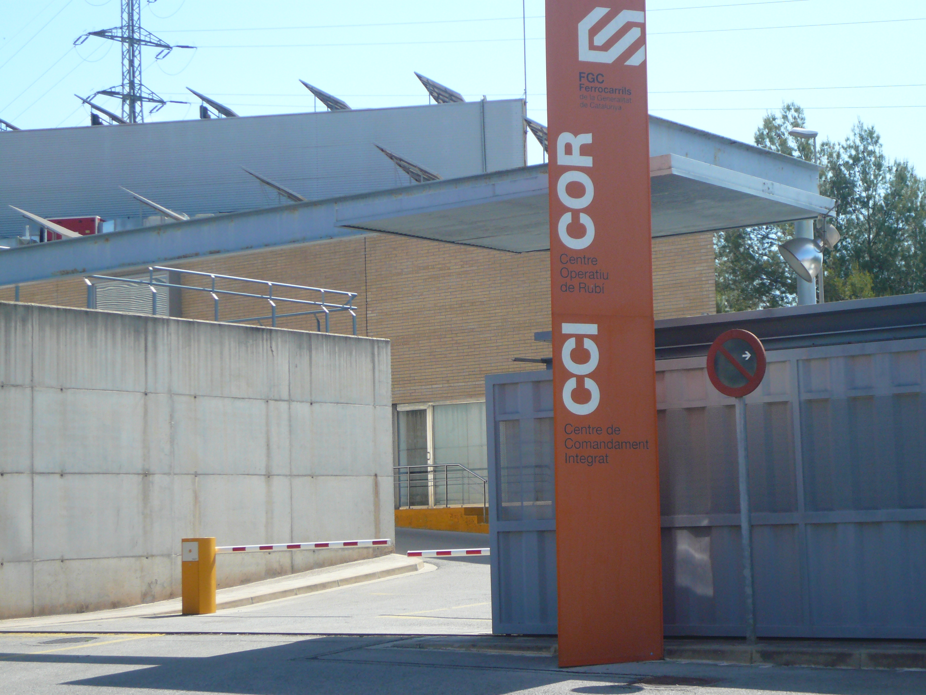 Centre Operatiu de Rubí i Centre de Comandament Integrat dels Ferrocarrils de la Generalitat, a Rubí.